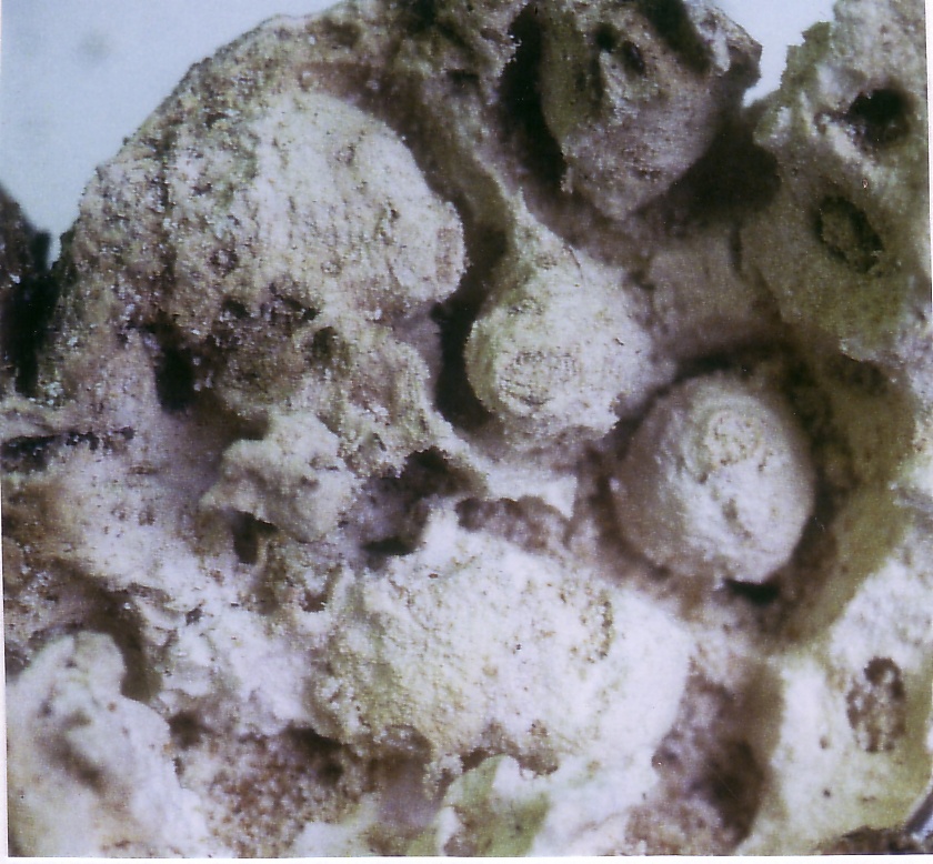 Puppenwiegen von Diaperis boleti im Trama von Piptoporus betulinus